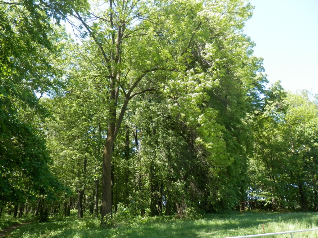 Obec Šarišské Dravce, okres Sabinov. Park pri kaštieli.